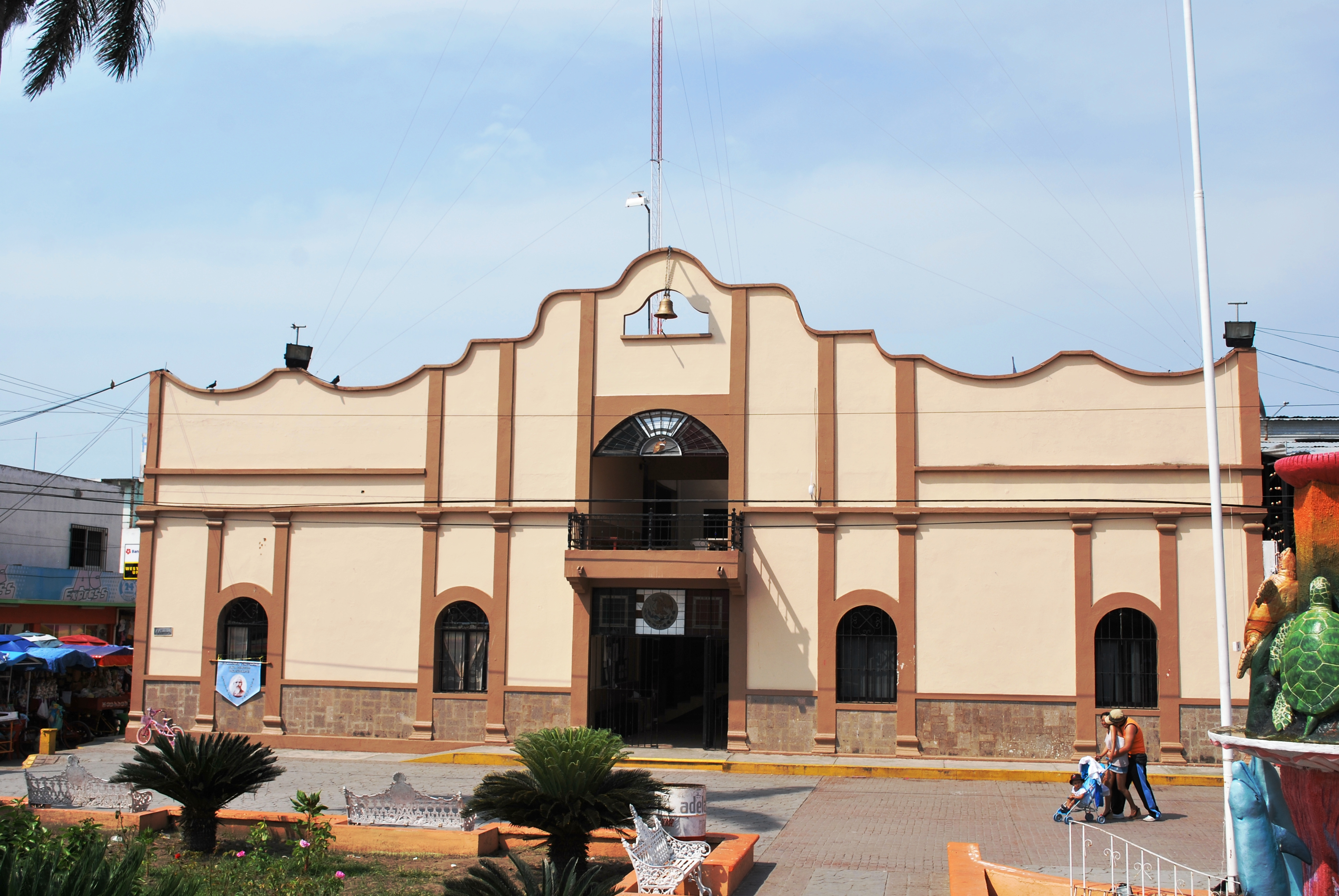 Municipal palace in Tecolutla, Veracruz